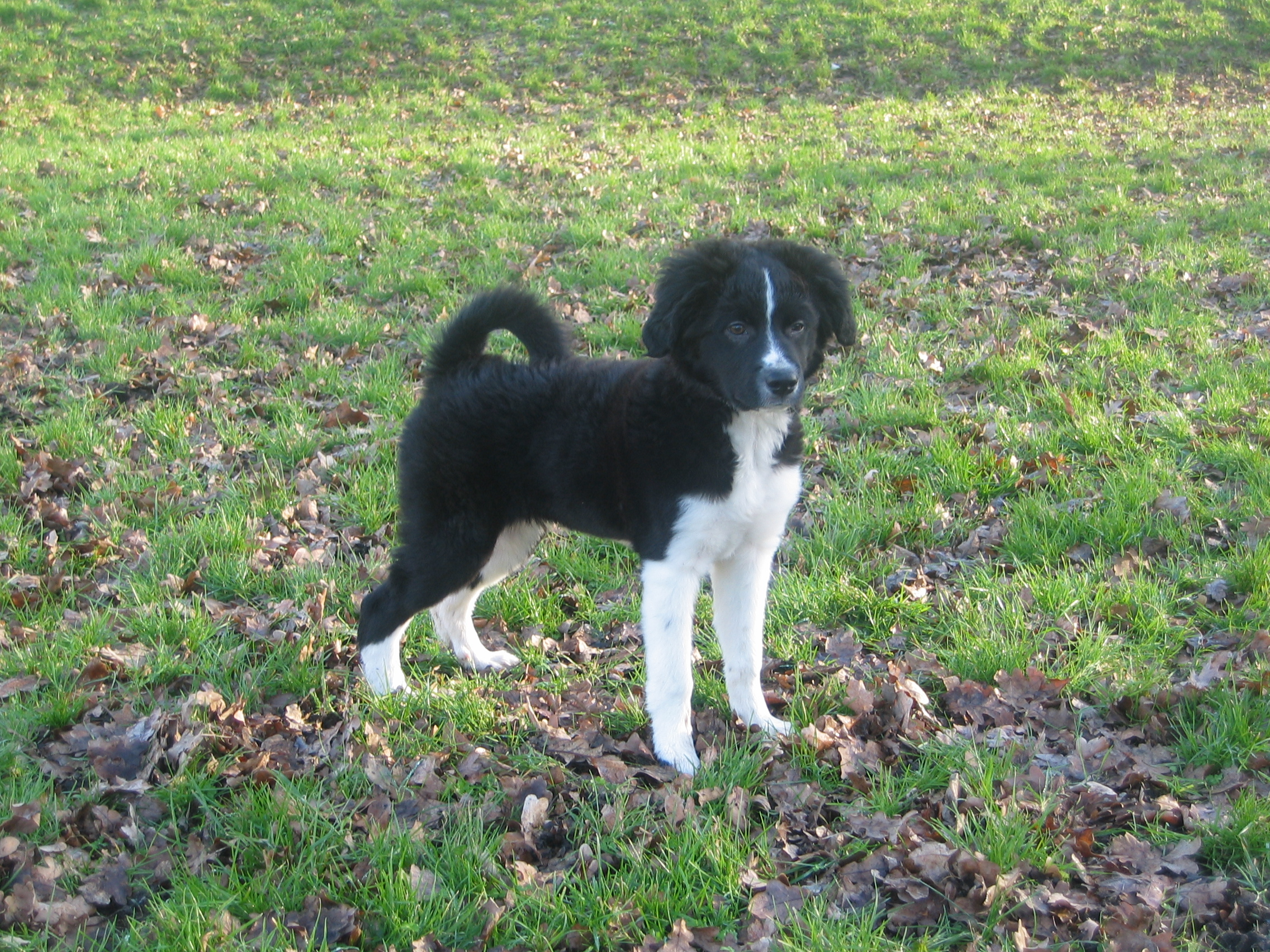 bubby